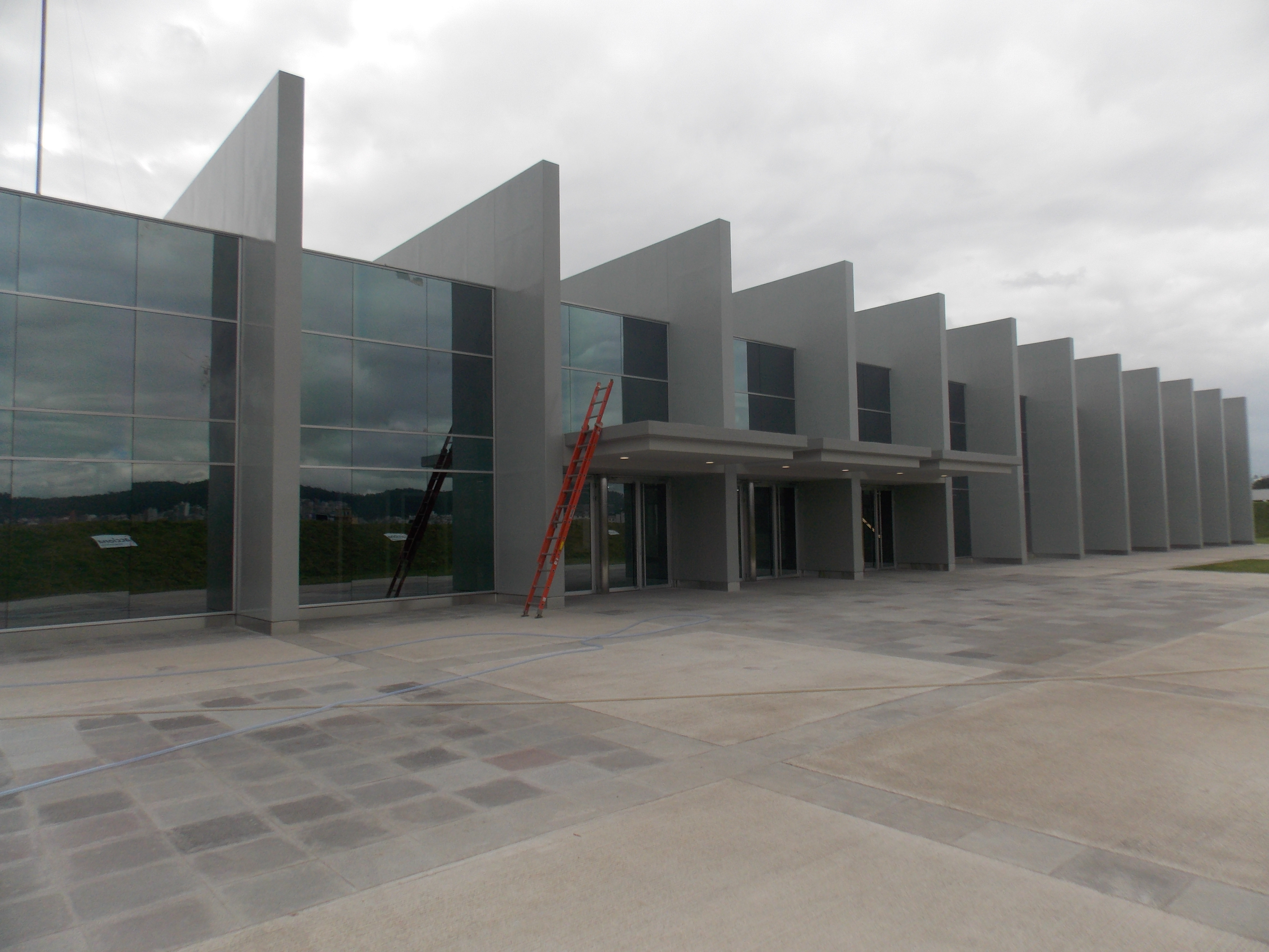 Estación El Labrador, cabecera norte del sistema de subterráneo de Quito (Ecuador).